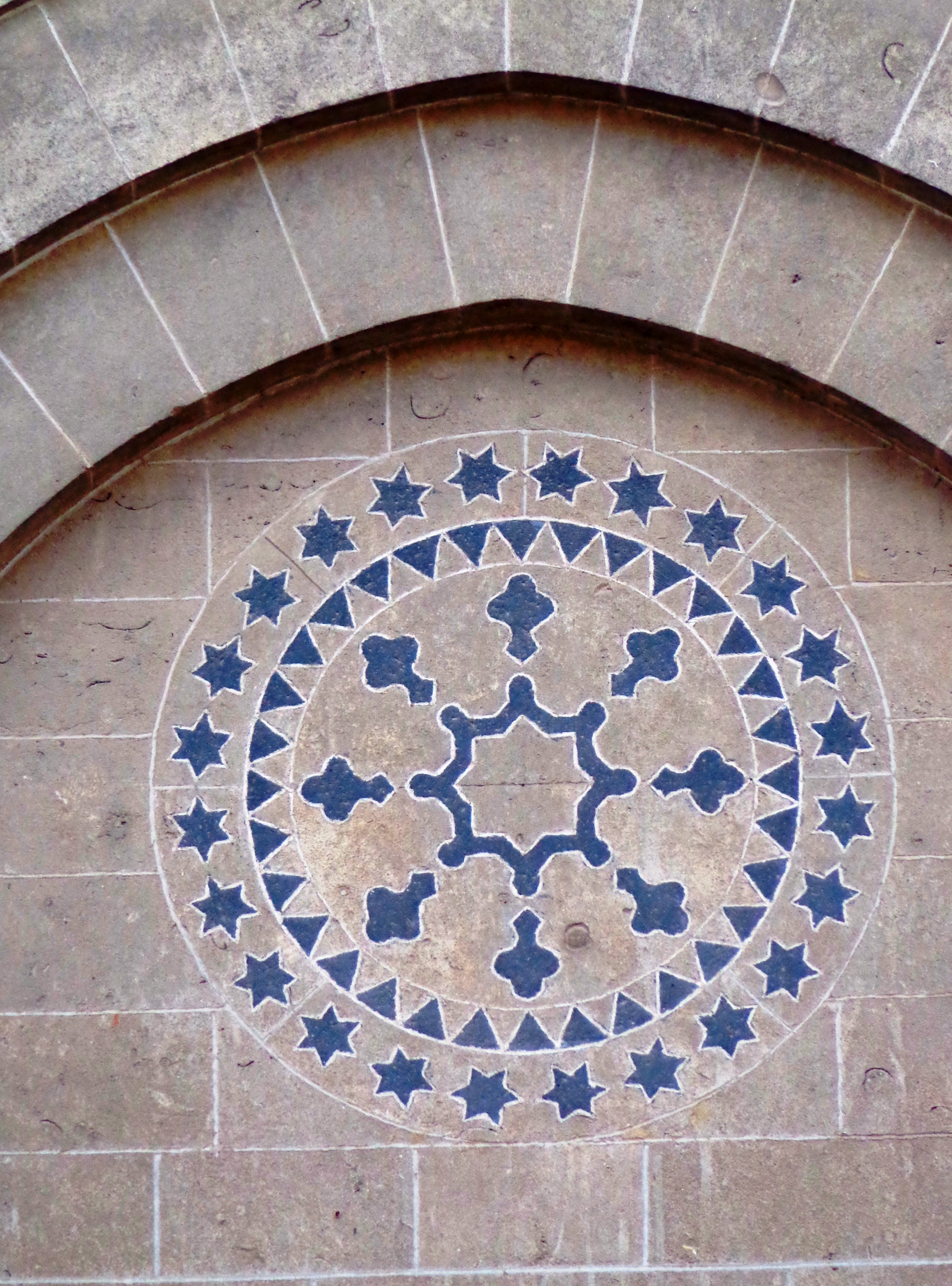 Dettaglio intarsi lavici